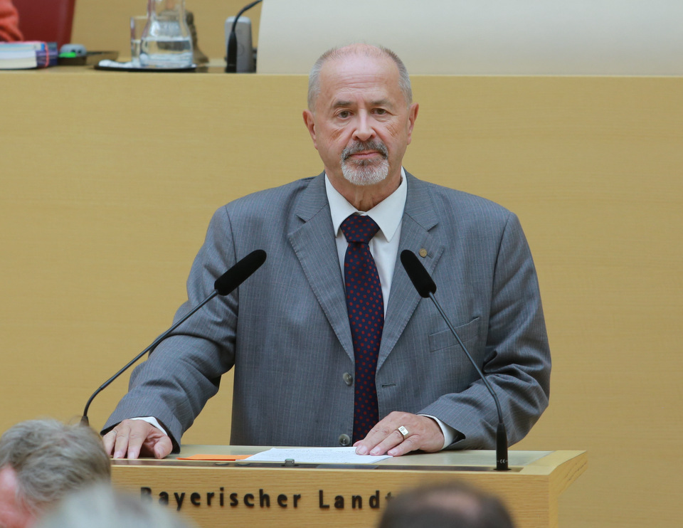 Jürgen W. Heike, deutscher Politiker (CSU) und Bayerischer Landtagsabgeordneter. Hier am 24. Januar 2017 während der aktuellen Stunde des Landtags zum Thema "Mobilisierung der Demokratie: Politische Bildung stärken!"